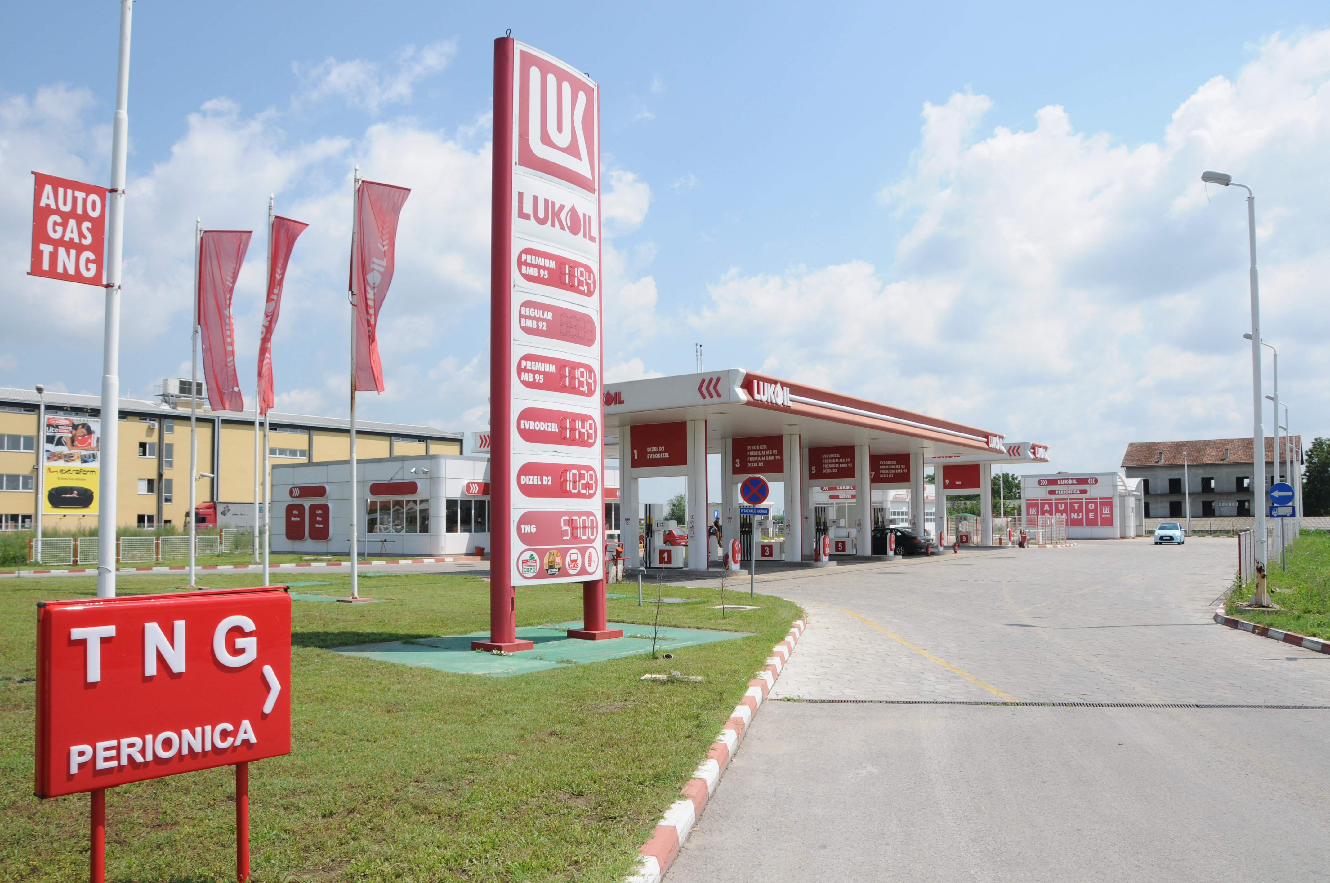 Бензинска станица Лукоил-Беопетрола у Новом Саду